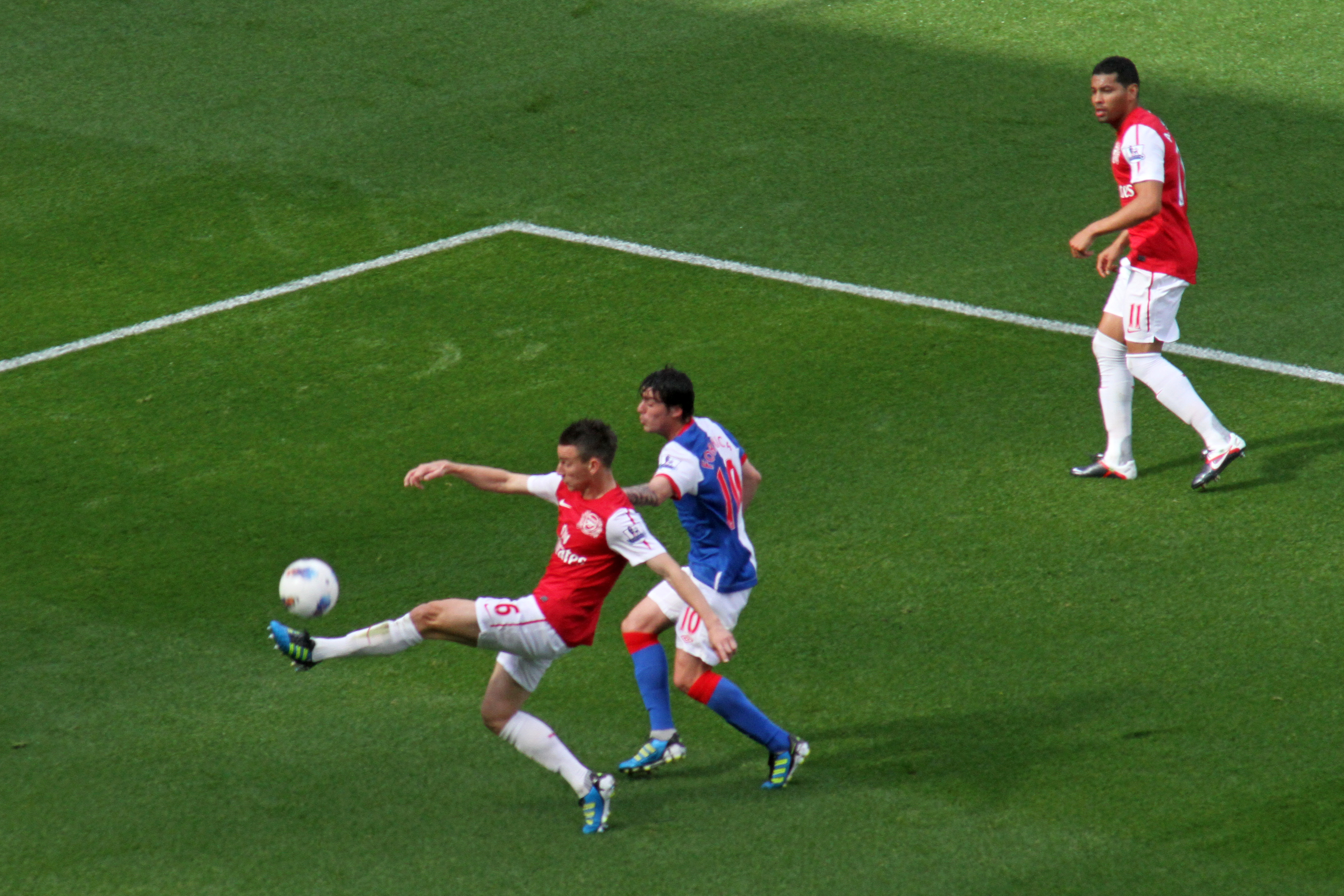 Laurent Koscielny, Mauro Formica and Andre Santos